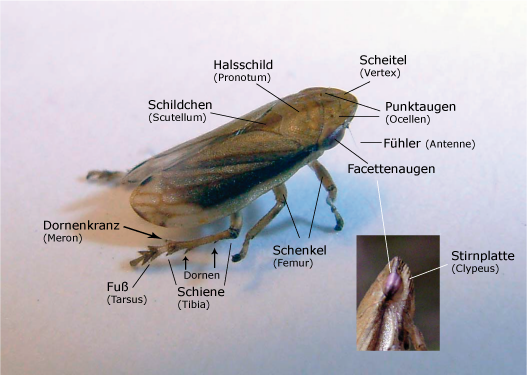 Grasschaumzikade (Neophilaenus lineatus), mit deutscher Beschriftung